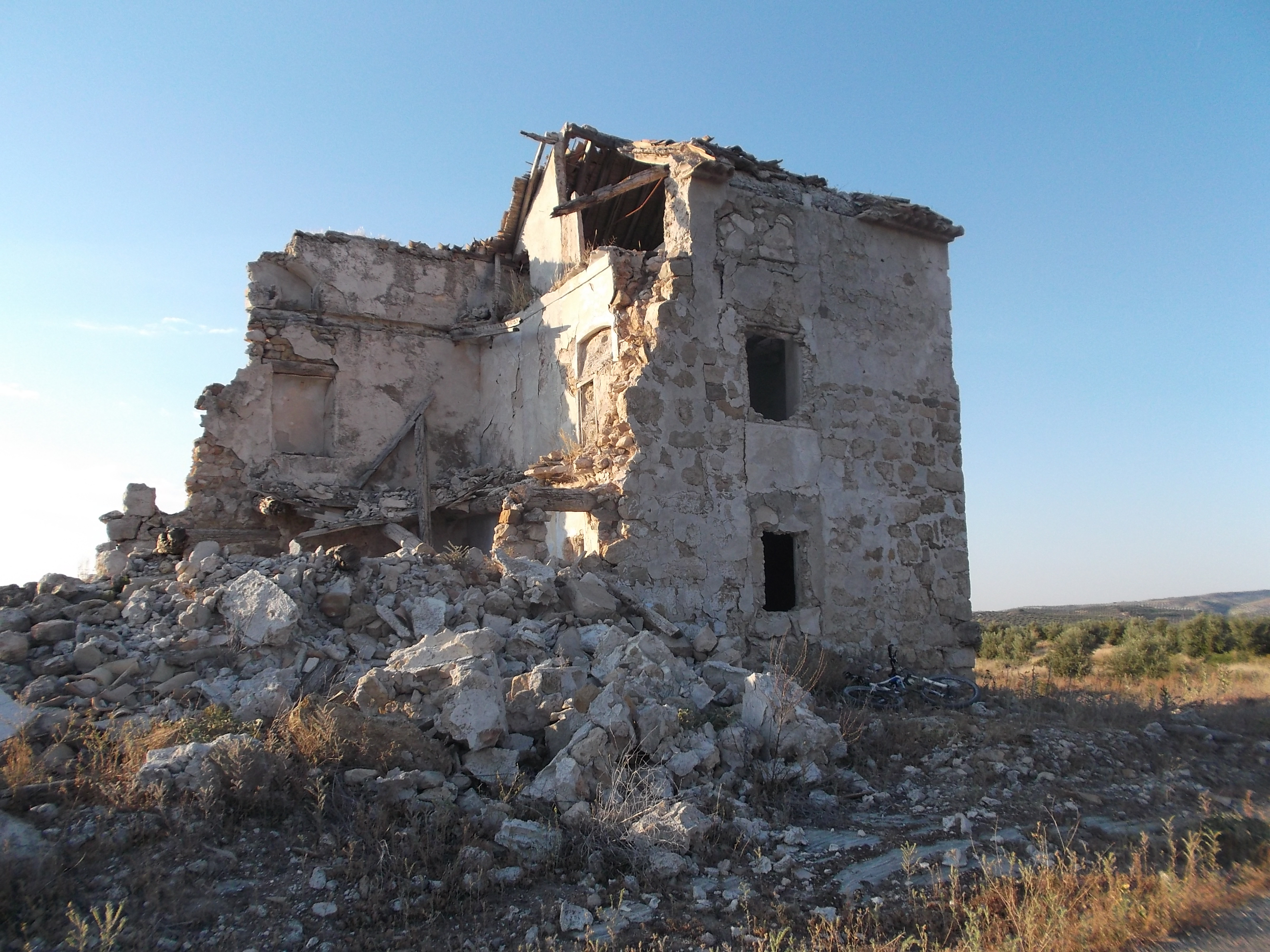 Vistas de la torre de Casa Fuerte